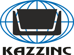 Официальный логотип компании "Казцинк"